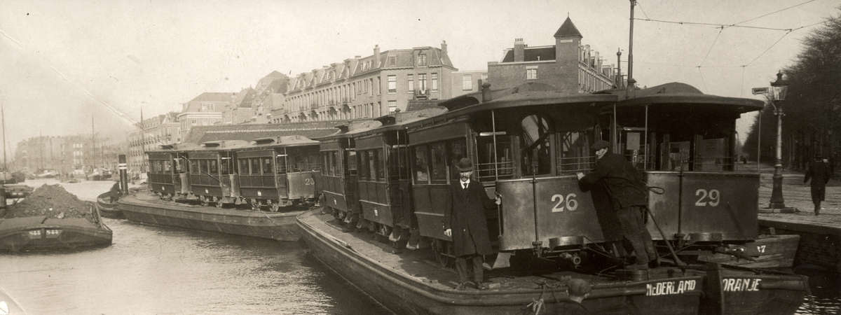 Op platbodems worden vanuit Amsterdam voormalige Amsterdamse paardentramrijtuigen naar Utrecht getransporteerd. Vervaardiger onbekend. Gelet op artikel 38 van de Auteurswet 1912 en de nadere invulling daarvan zoals verduidelijkt onder punt 1.1.5.12 van de Juridische wegwijzer archieven en musea online en de discussie hier is het auteursrecht op deze afbeelding vervallen vanaf 1 januari 1988.